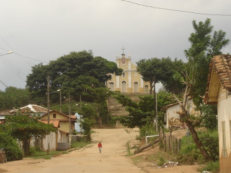 Frei Serafim, distrito do municipio de Itambacuri, Minas Gerais